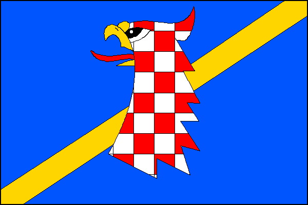 vlajka, Sobíšky, okres Přerov